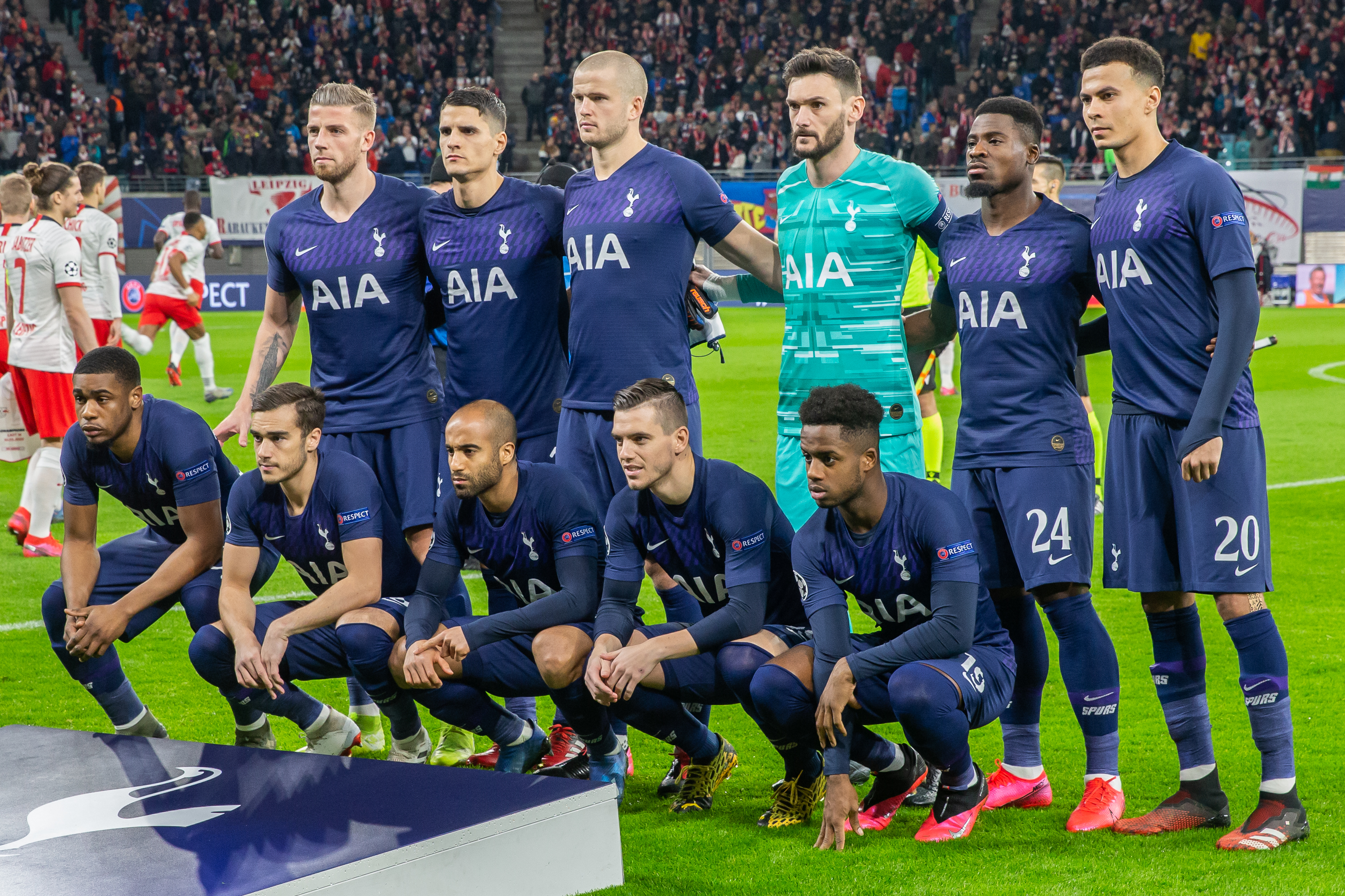 Fußball, Männer, UEFA Champions League Achtelfinale, RB Leipzig - Tottenham Hotspur; Mannschaftsfoto, Aufstellung, team photo Tottenham Hotspur